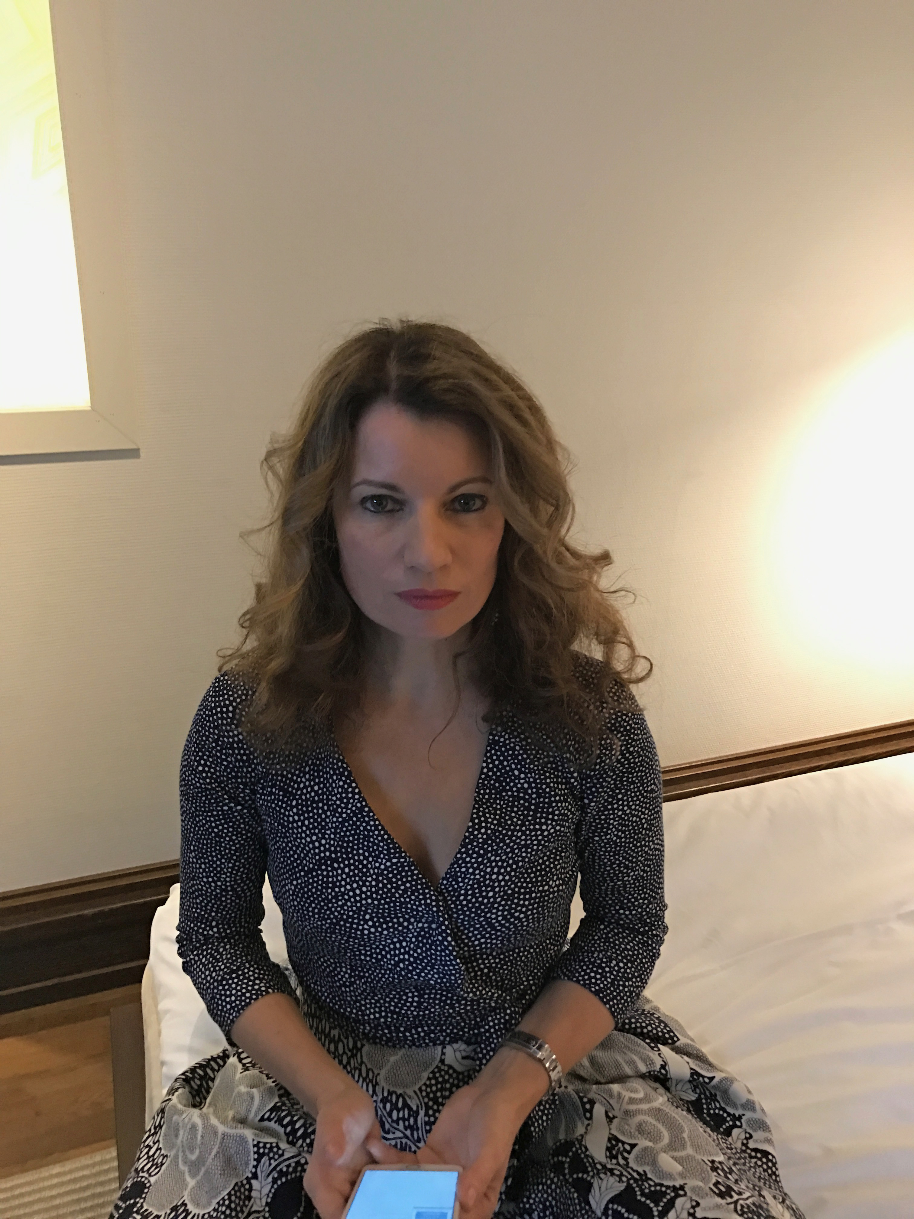 Alexandra på turné.